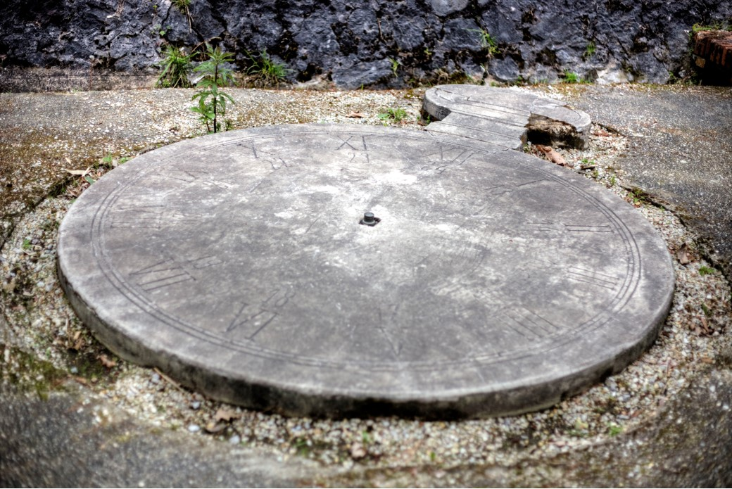 Reloj del patio didáctico de las antiguas escuelas de Arnao, Castrillón, Asturias.